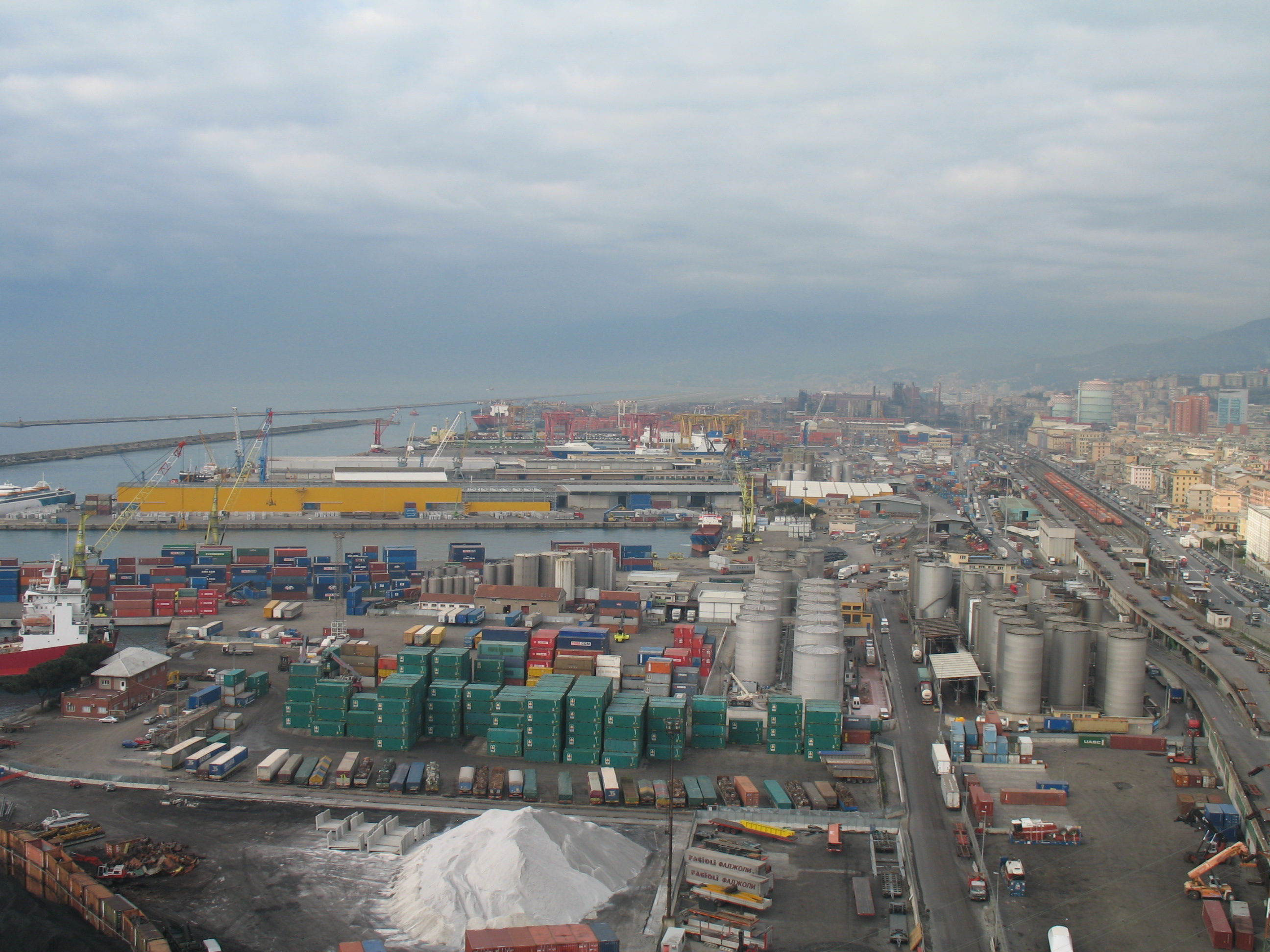 Immagine dal Porto di Genova (terminal, moli, container, calate, ecc.)